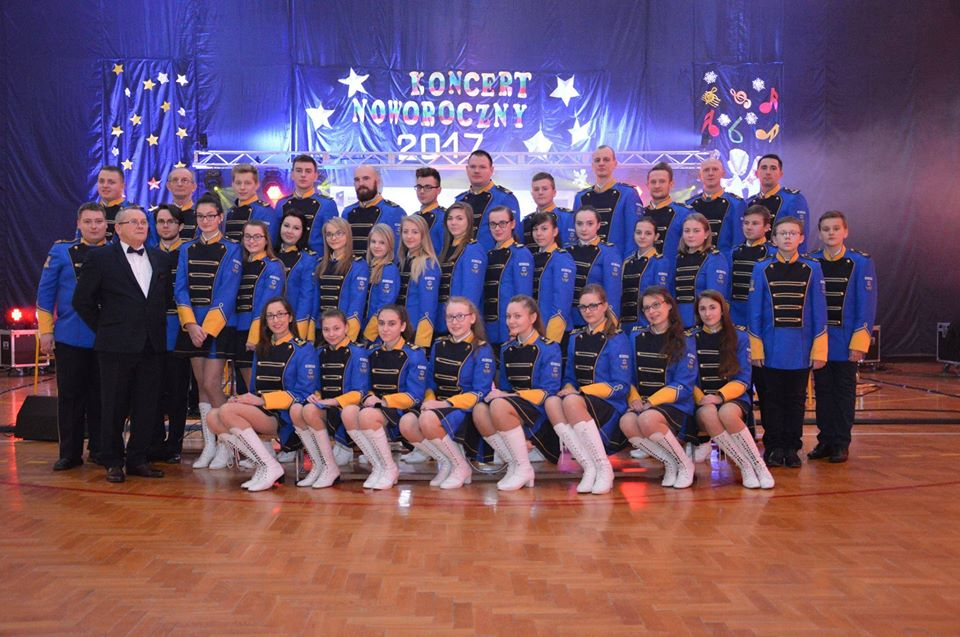 Orkiestra Gozdowo przed Koncertem Noworocznym 2017